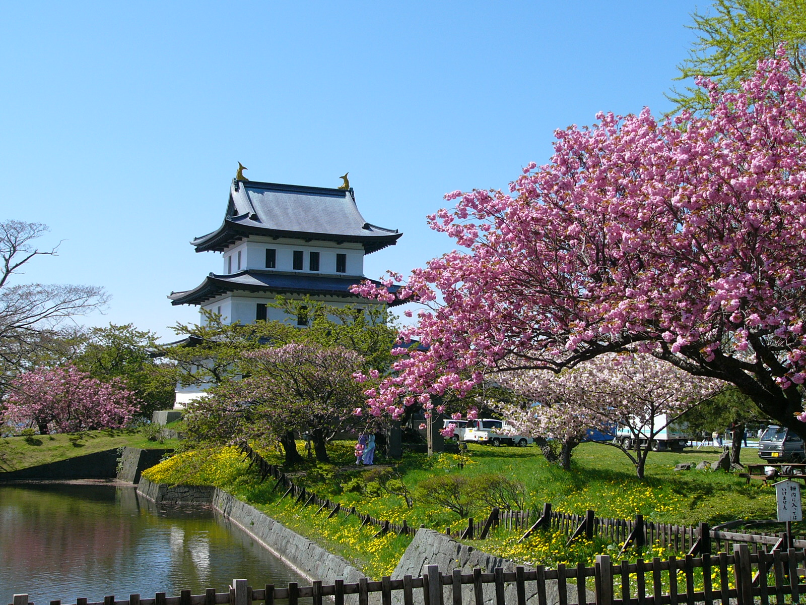 北海道松前郡松前町字松城